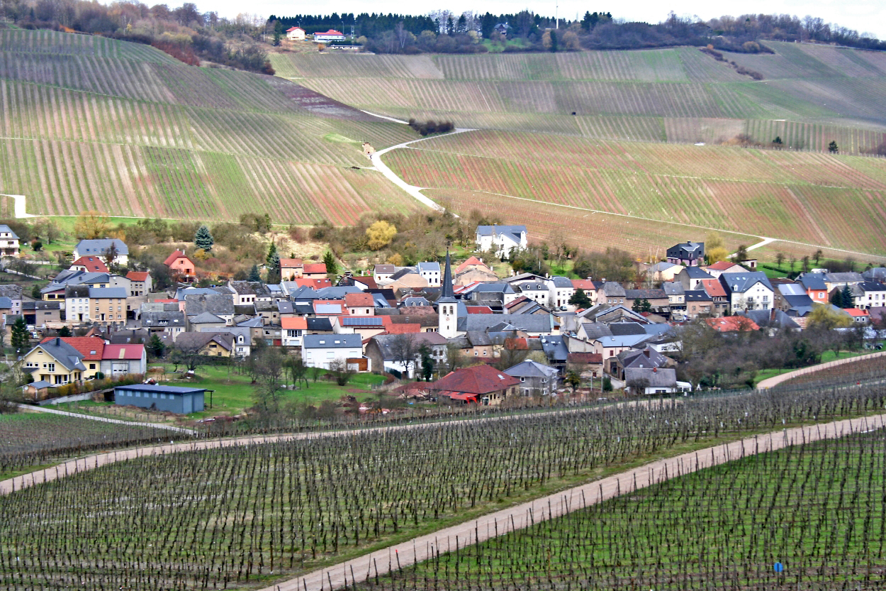 Wellesteen aus de Wengerte gesinn (Abrëll 2006)